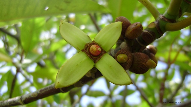 ދިވެހިބަސް: މި ފޮޓޯއަކީ ކަނޑޫގެ ބާވަތެއްކަމުގައިވާ ތަކަފަތީގެ ފޮޓޯއެކެވެ.